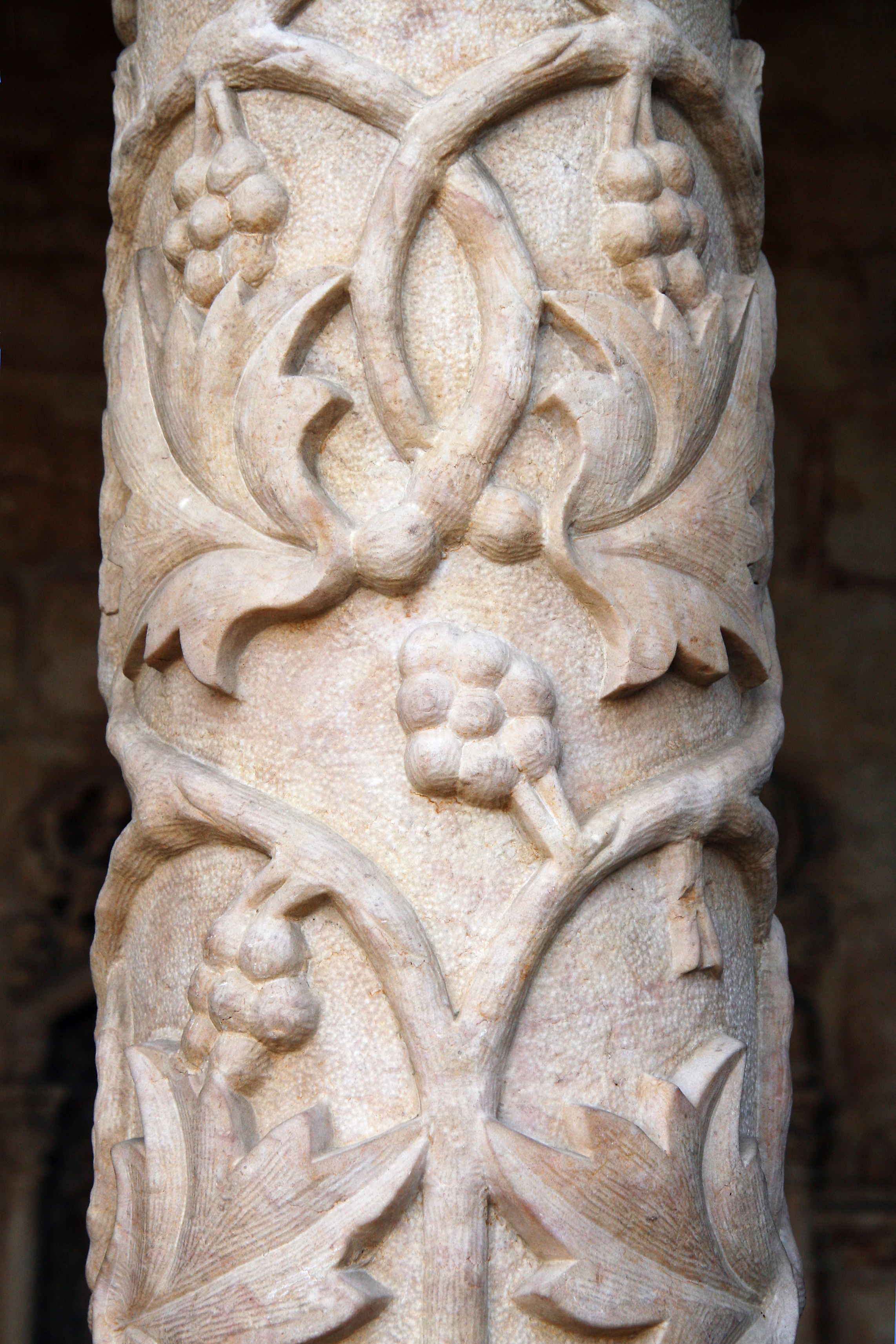 Hieronymus-Kloster im Stadtteil Belém in Lissabon, Portugal (Säule im Kreuzgang)